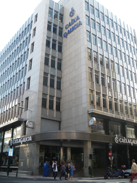 Edificio de la Oficina Principal de Caixa Galicia en A Coruña.